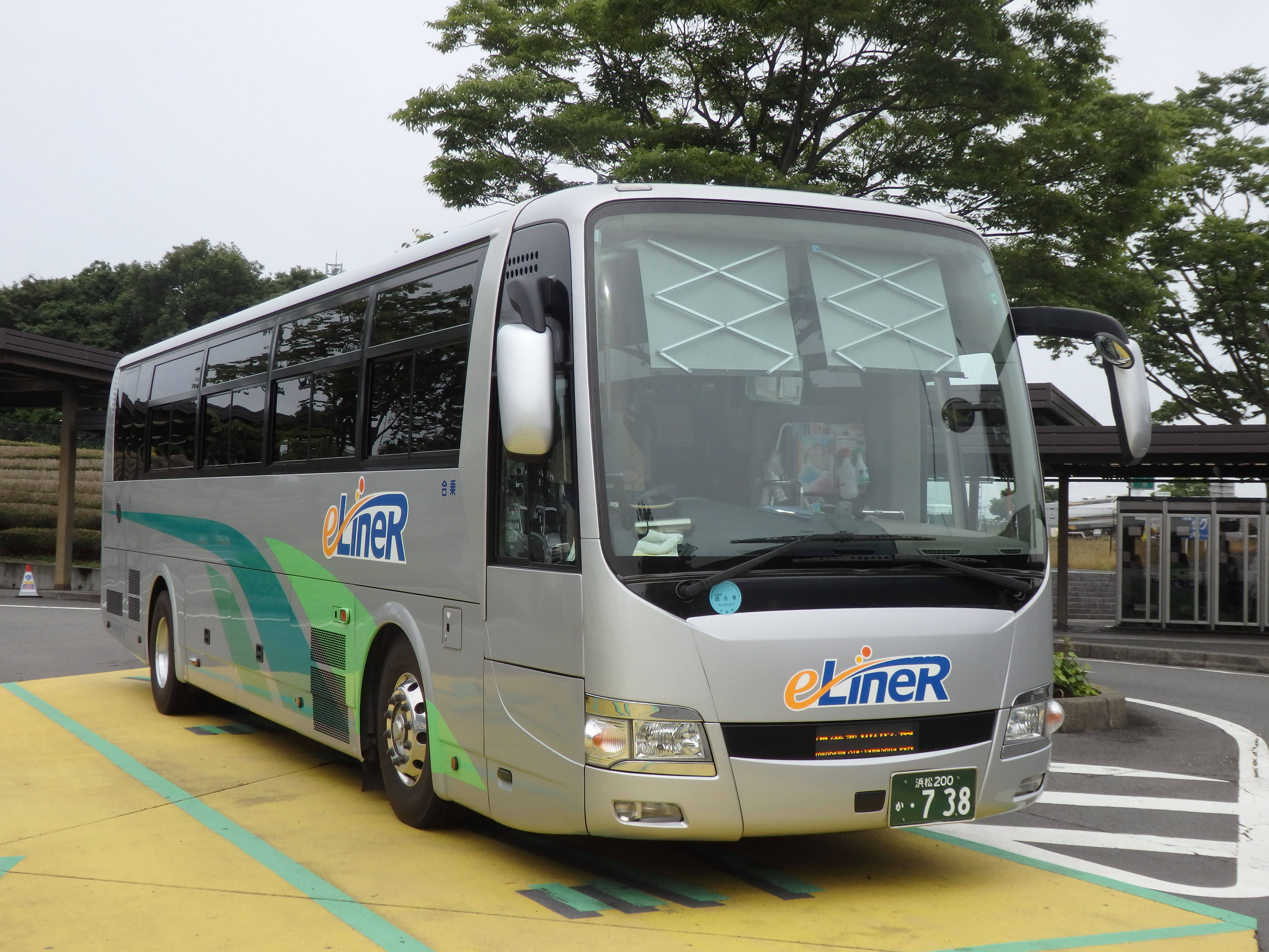 遠州鉄道ターミナル営業所所属のe-LineR用のエアロエース